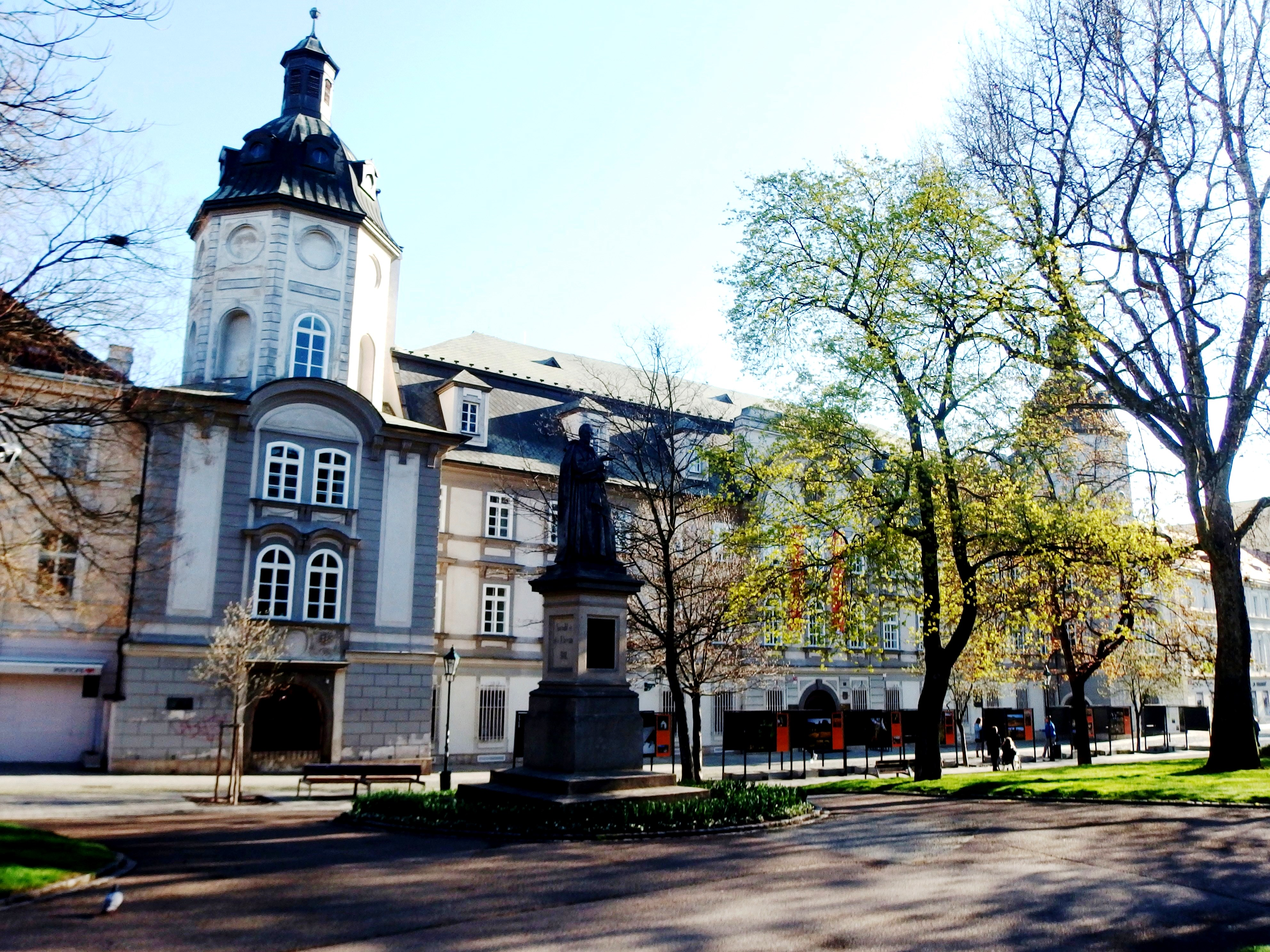 Studijní a vědecká knihovna Plzeňského kraje, Smetanovy sady 179/2, 301 00 Plzeň.